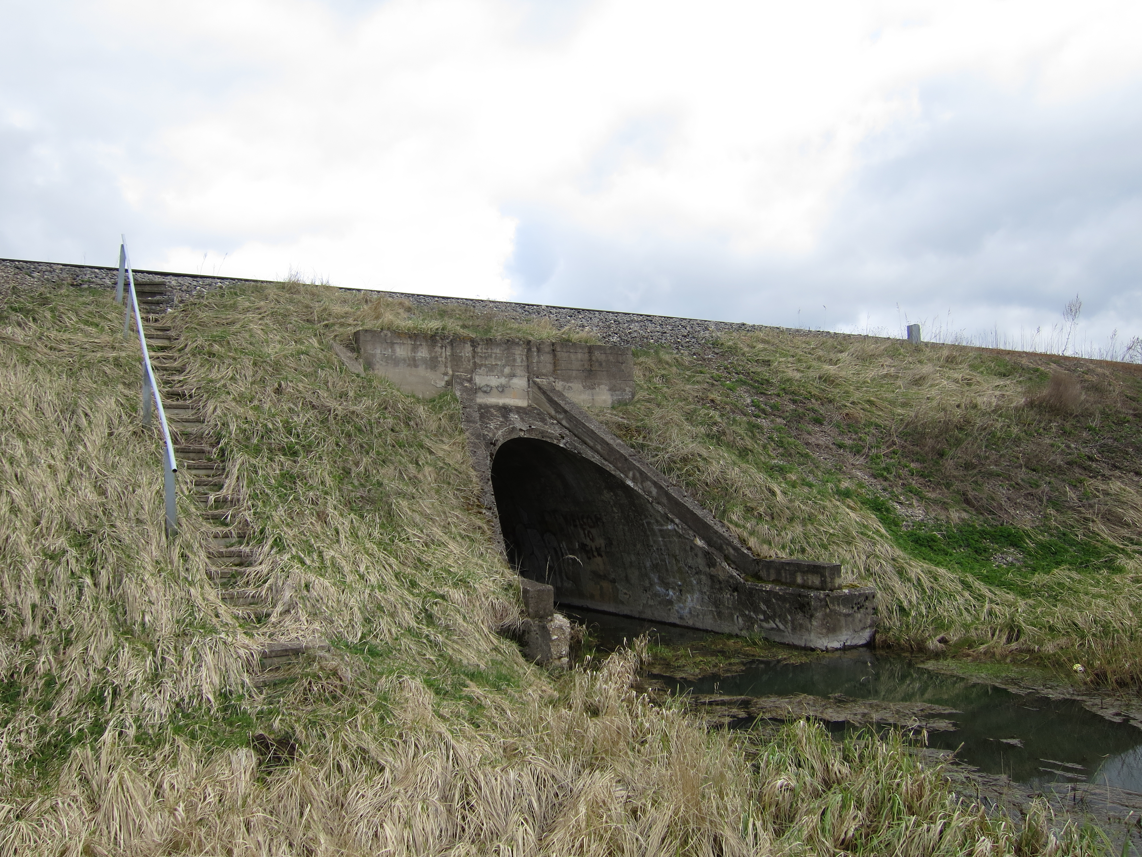 Slimnīcas strauta caurteka netālu no Saldus stacijas